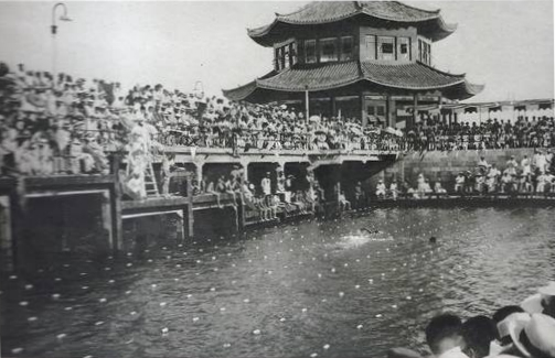 青岛第十七届华北运动会游泳比赛